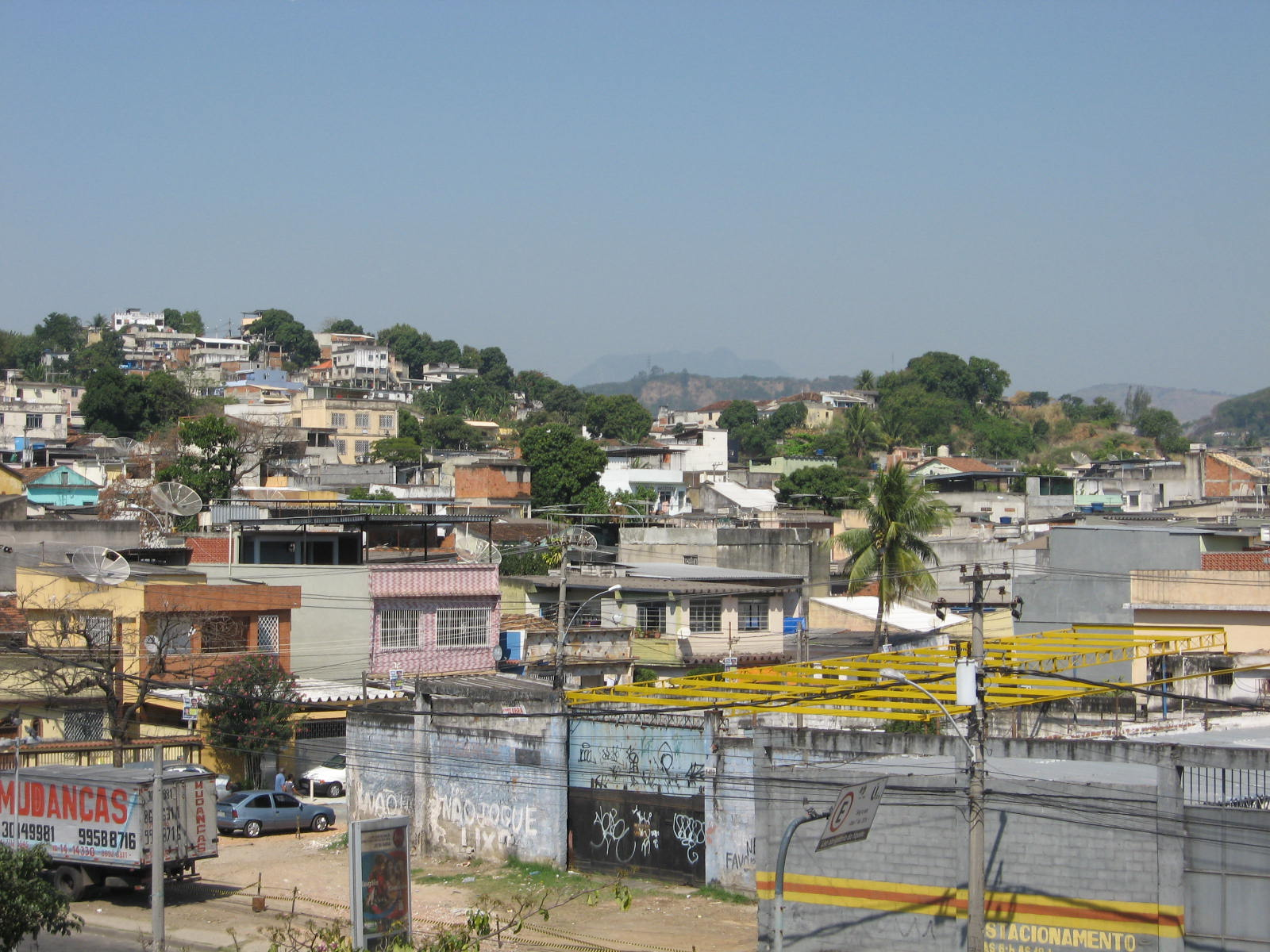 Vista do bairro de Colégio, na cidade do Rio de Janeiro, Brasil.